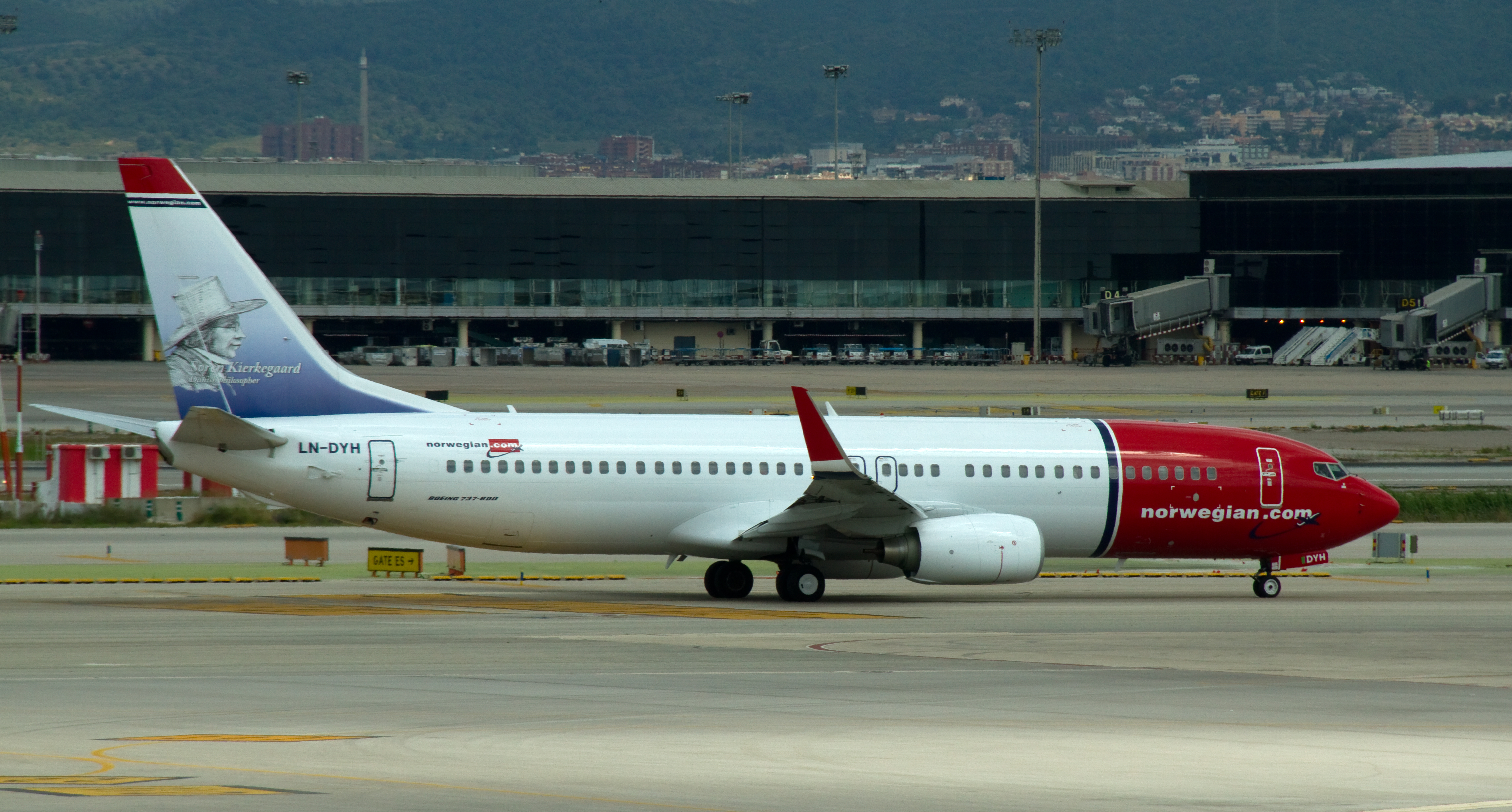 Boeing 737-800 LN-DYH